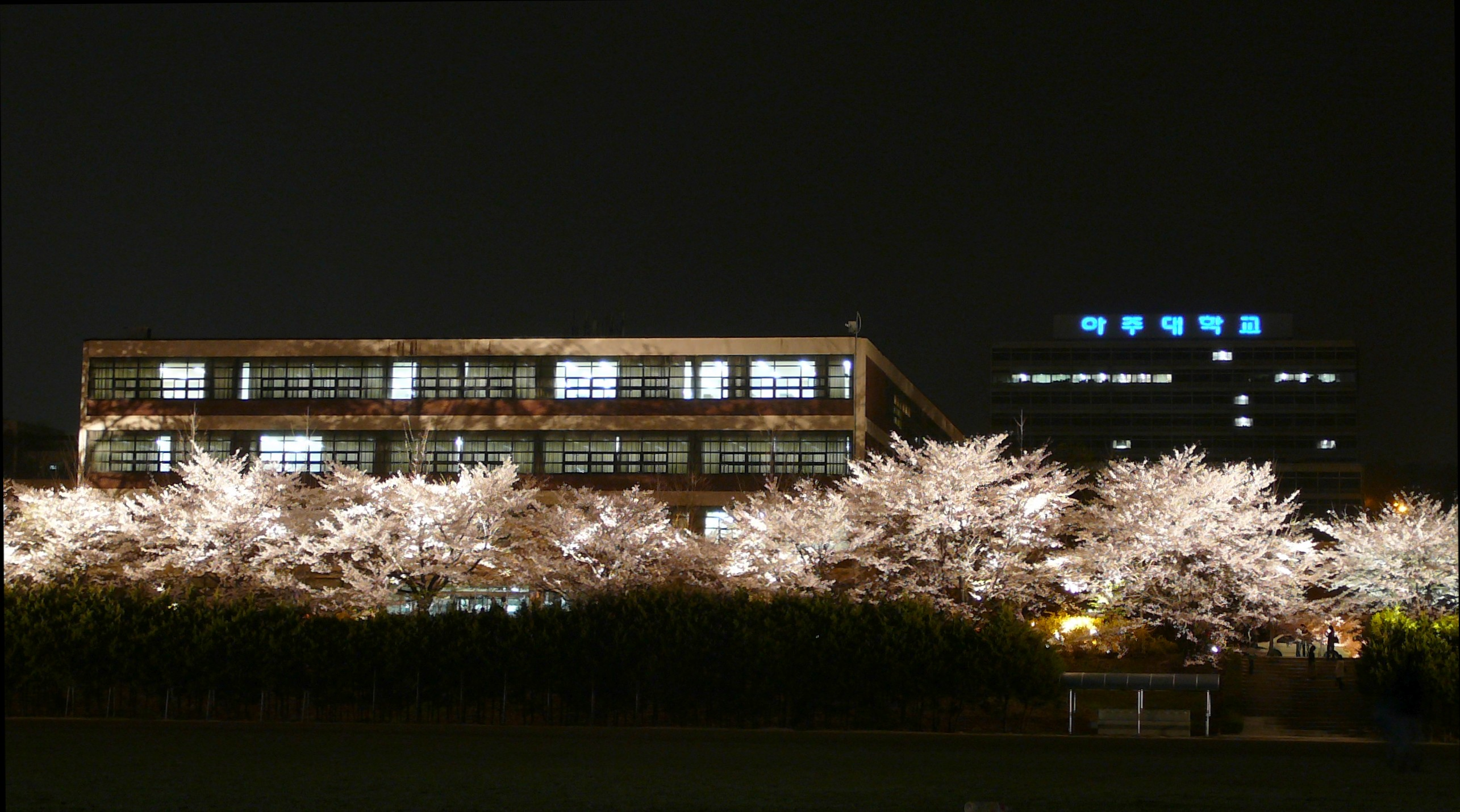 벚꽃이 피어있는 아주대학교 도서관 야경(뒤에 보이는 건물은 팔달관)